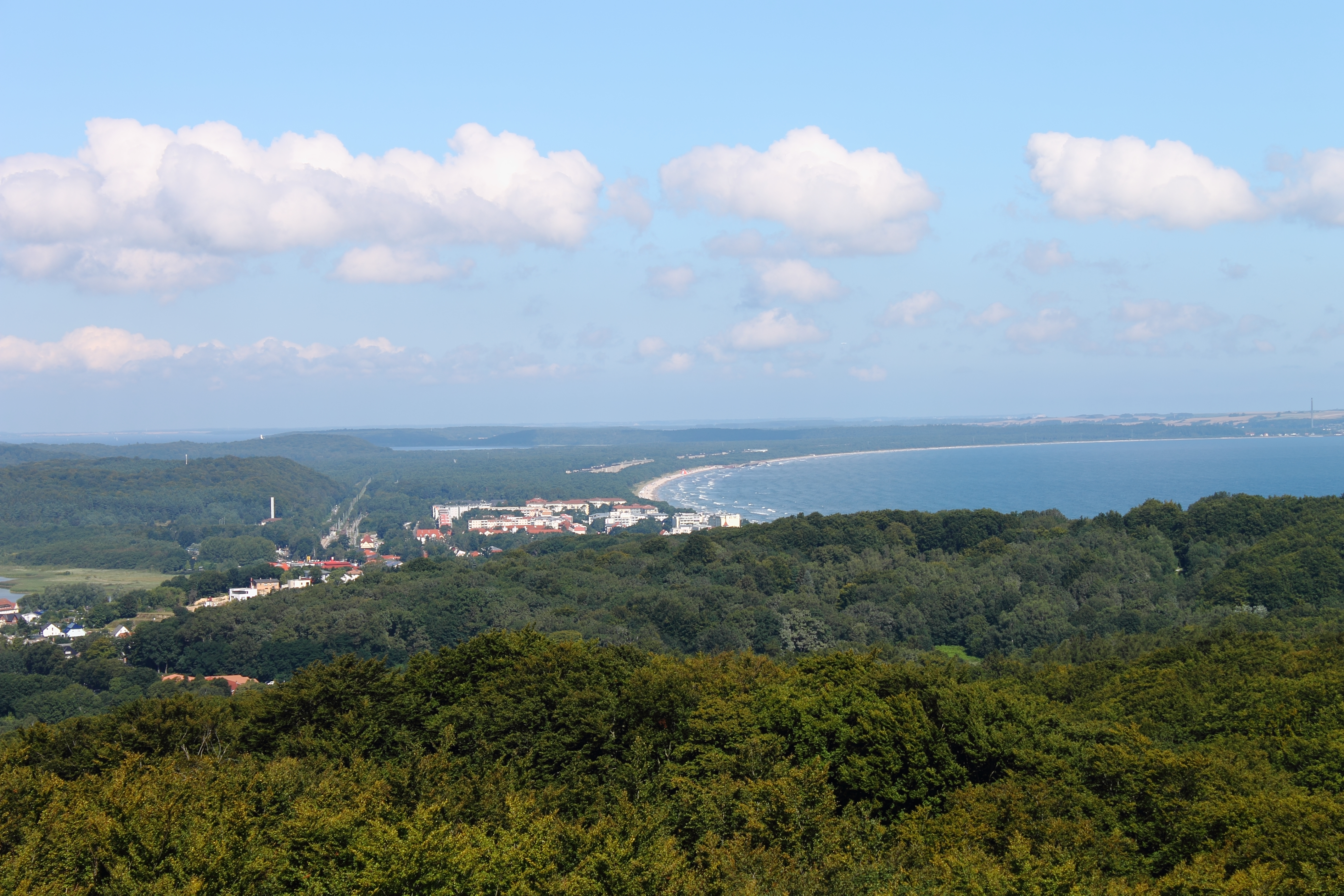 Blick auf Binz und Prorer Wiek vom Jagdschloss Granitz